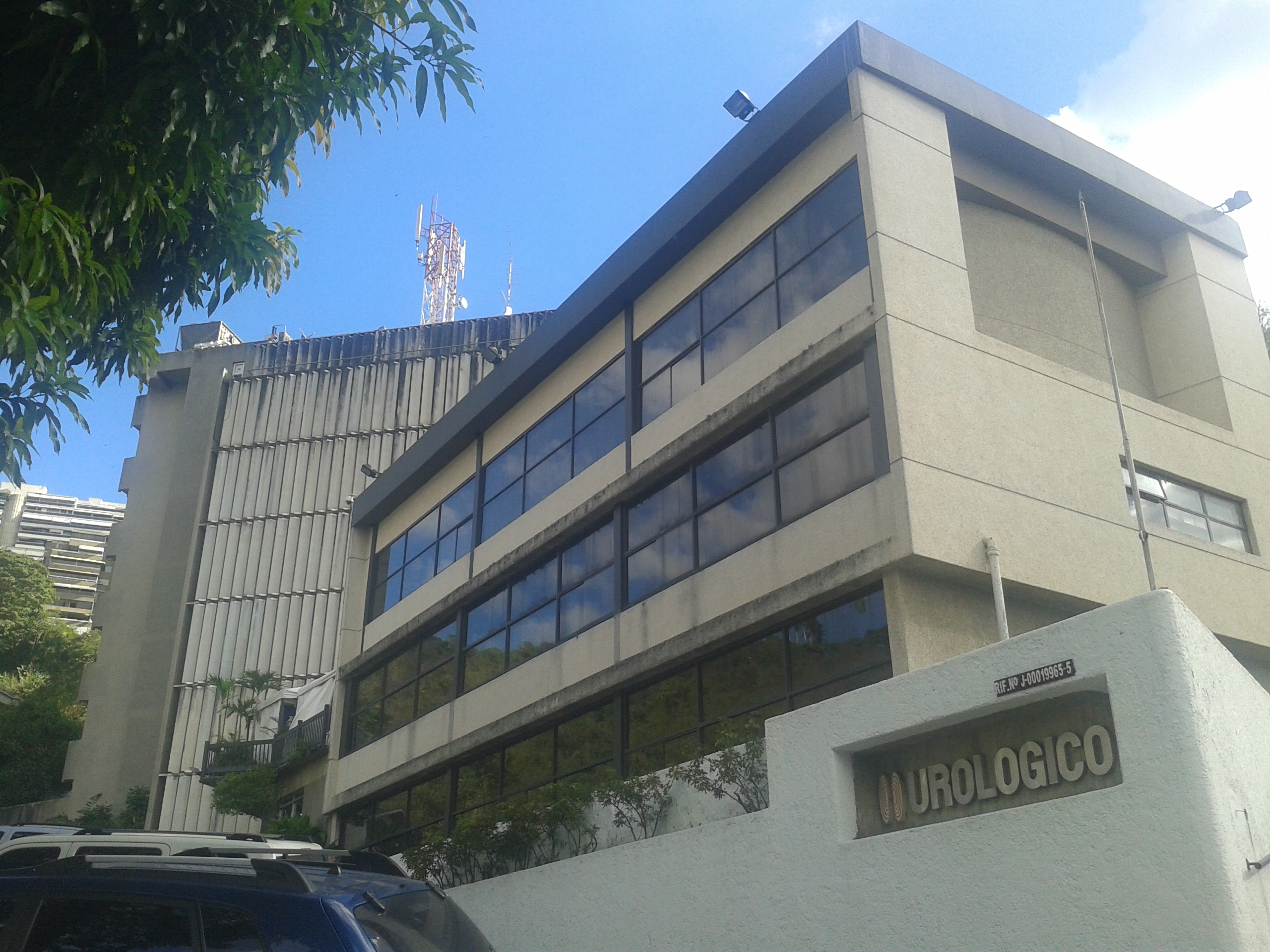 Urológico San Román en Caracas, Venezuela